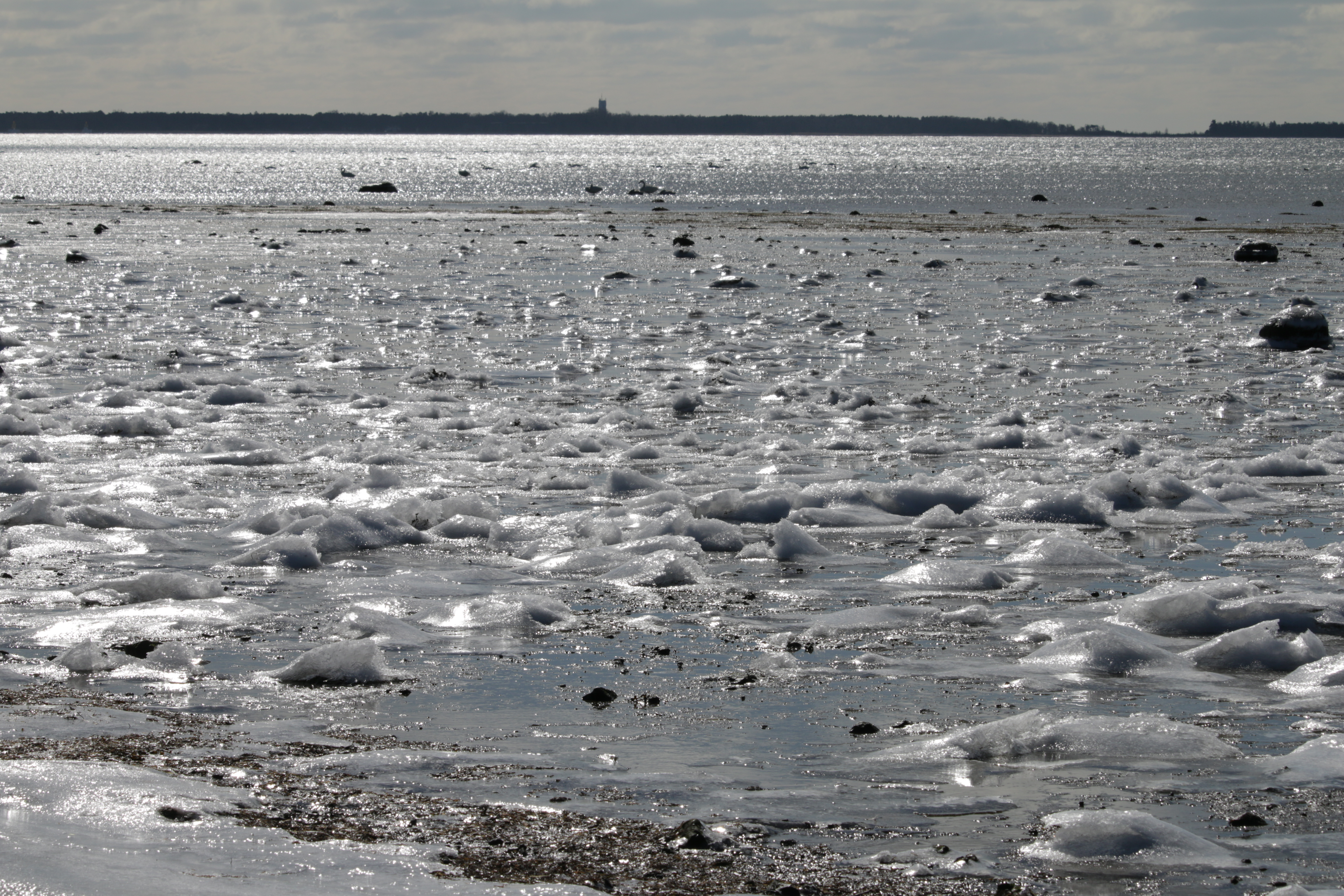 Höllviken från Hammarsnäs vinter